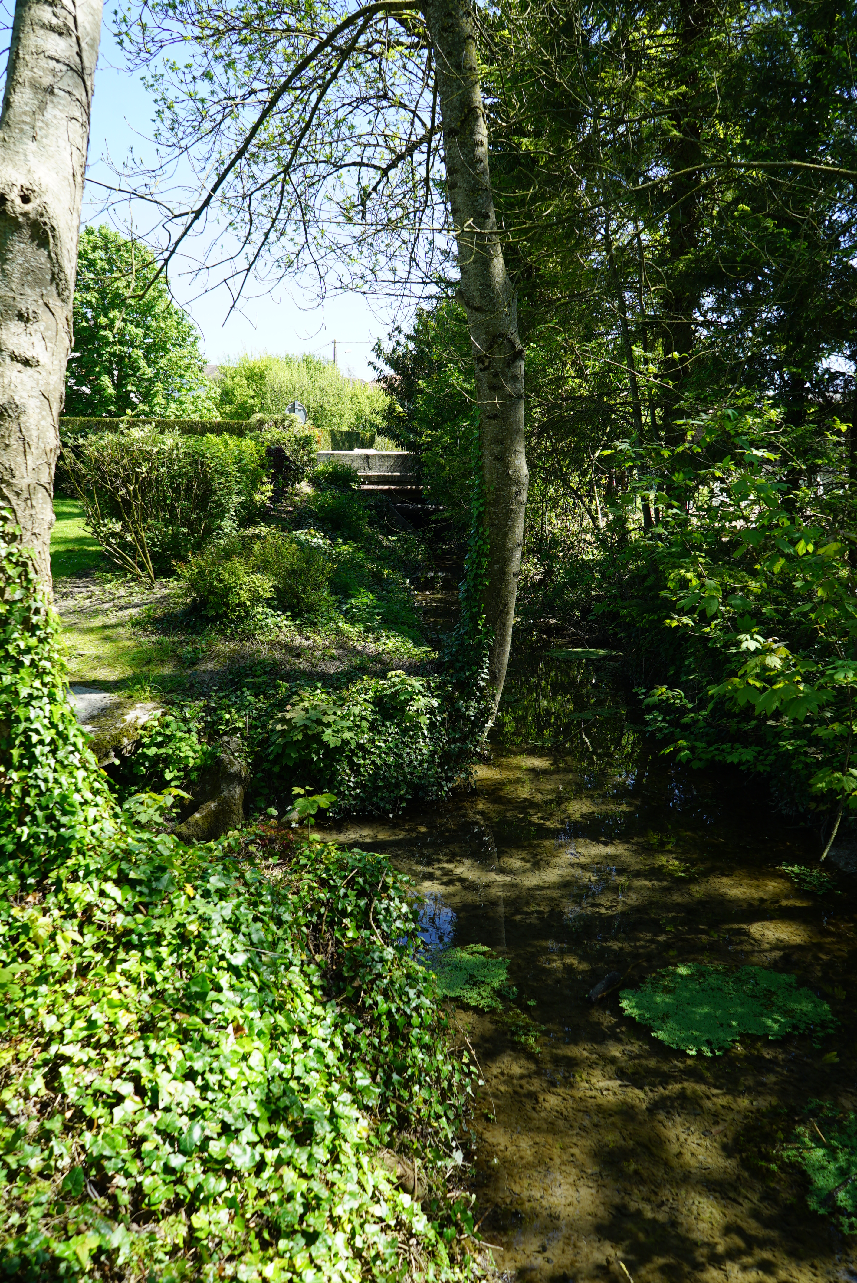 vue des deux sources de la SUippe.